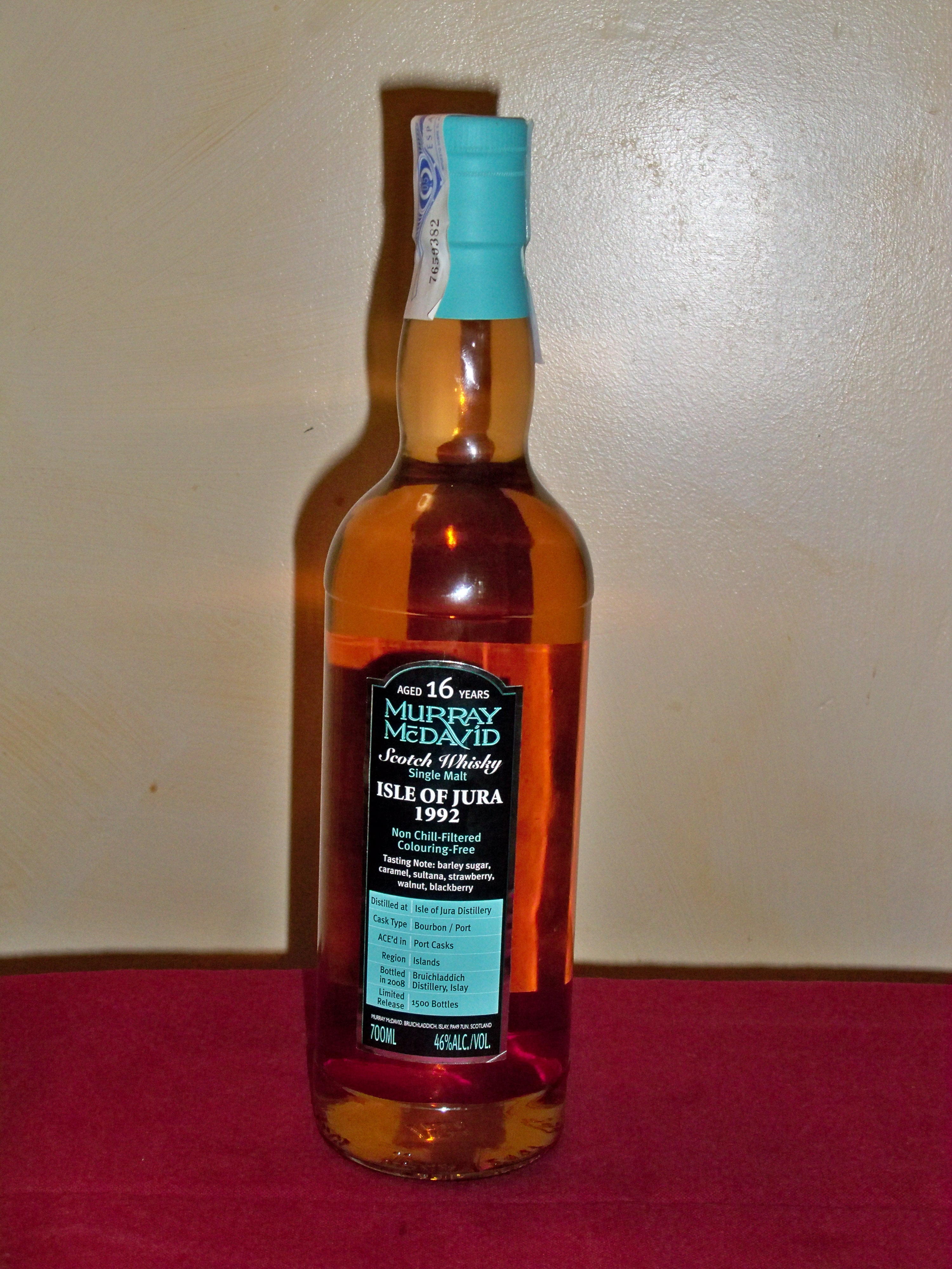 bouteille de Isla of Jura